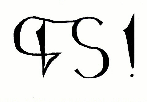 Zirkel der K.D.St.V. Saarland